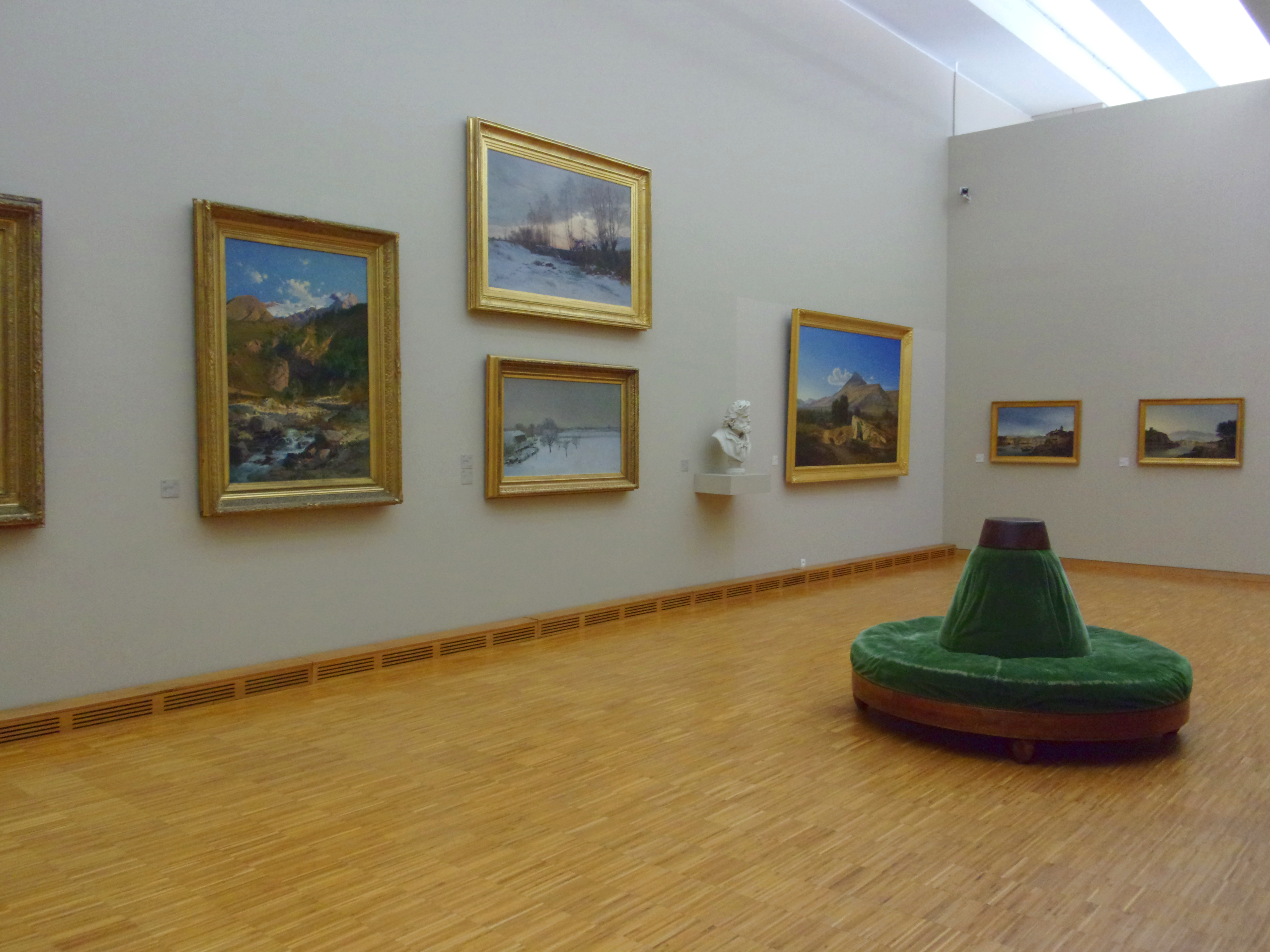 Salle 21 (école dauphinoise du XIXe siècle) au musée de Grenoble.